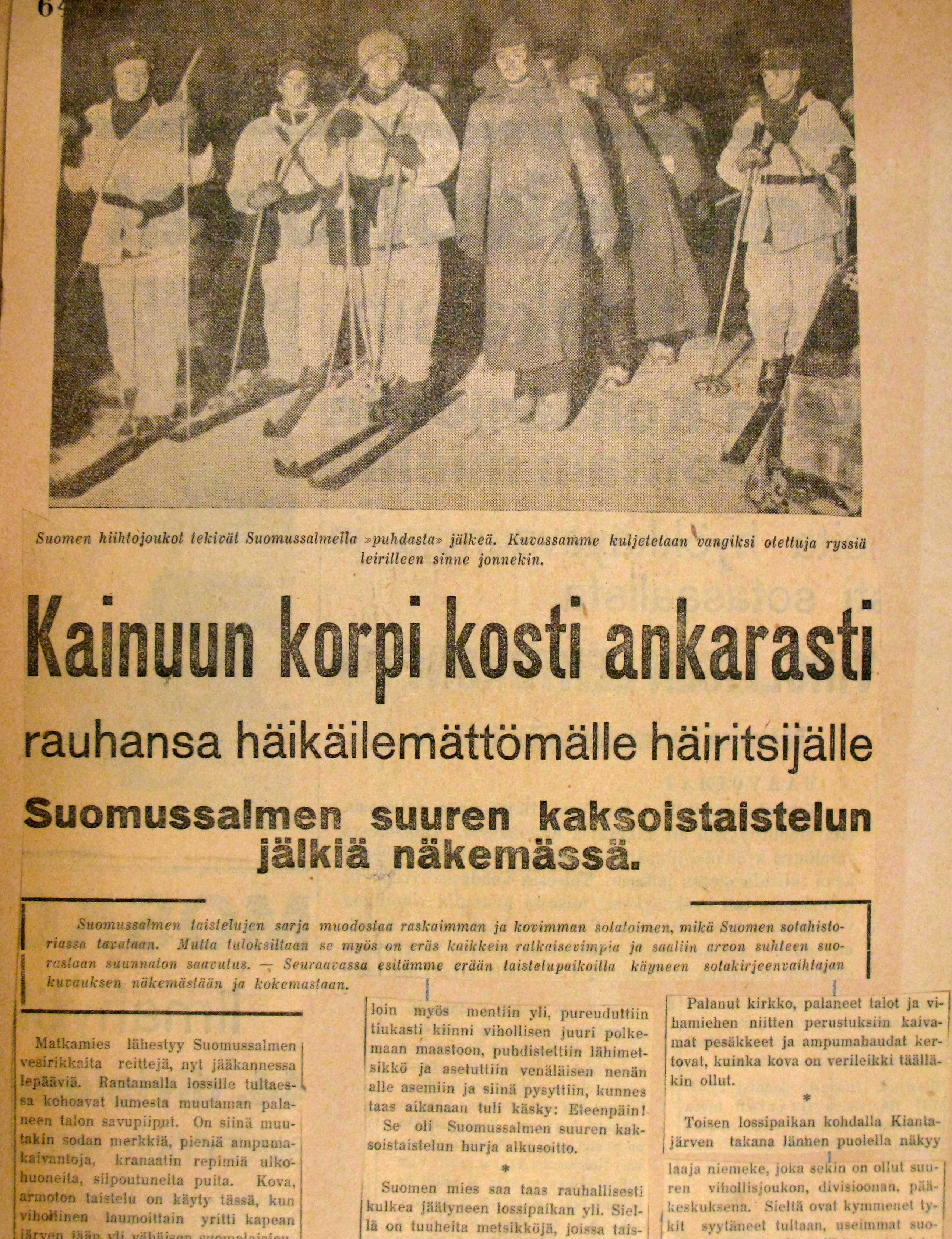 Lehtileike koskien Suomussalmen taisteluita talvisodassa (sivu yksityiseen arkistoon kuuluvasta leikekirjasta).